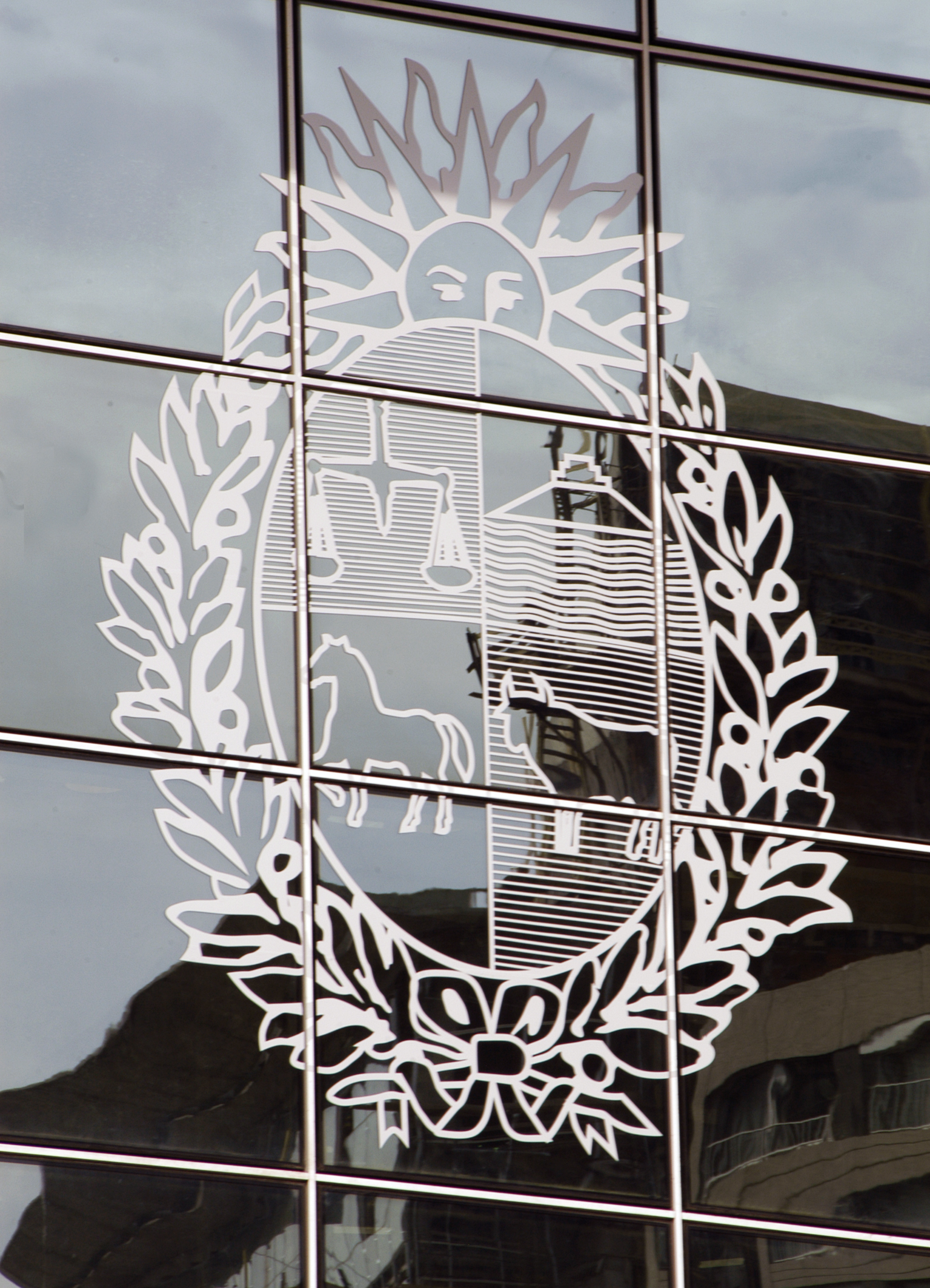 Escudo Nacional en la fachada de la Torre Ejecutiva